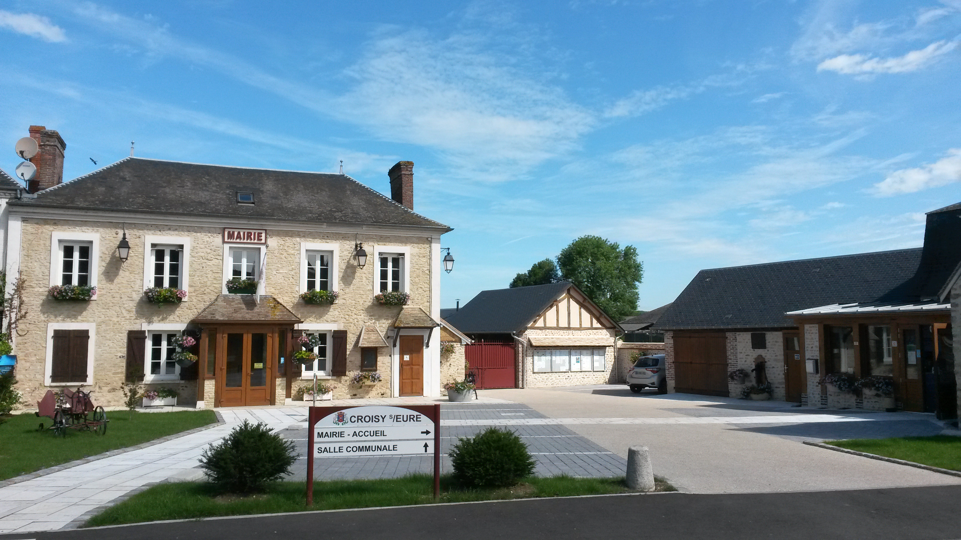 Mairie après travaux (2018)